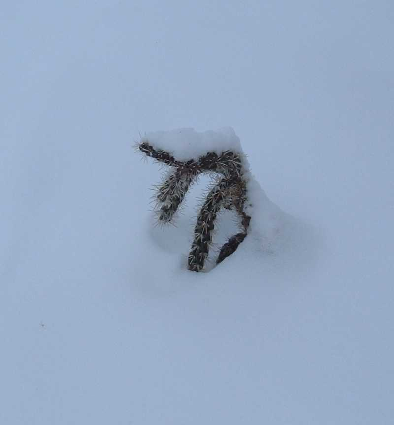 Saját felvétel a kaktuszomról a télálló kertben. Cylindropuntia imbricata télen